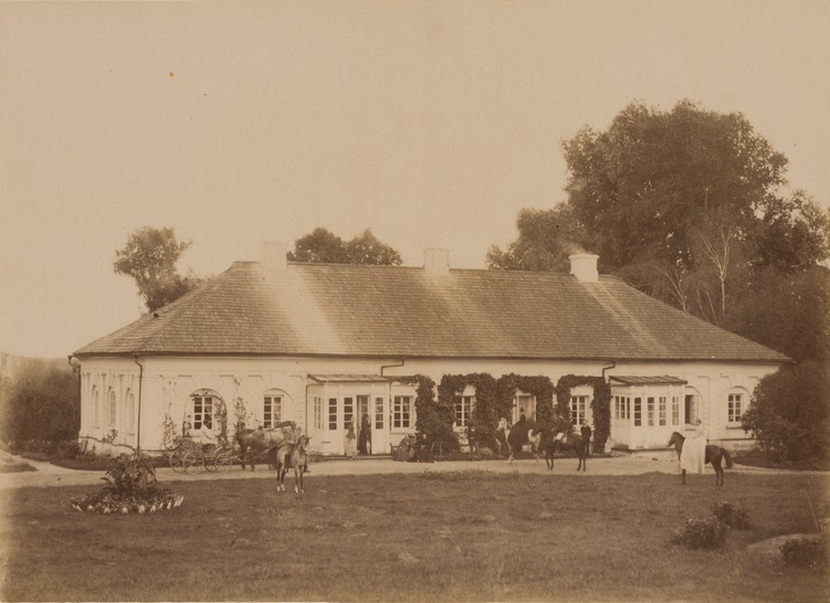 Беларуская (тарашкевіца): Сянежыцы (Sianiežycy), сядзіба Юндзілаў (Jundził)